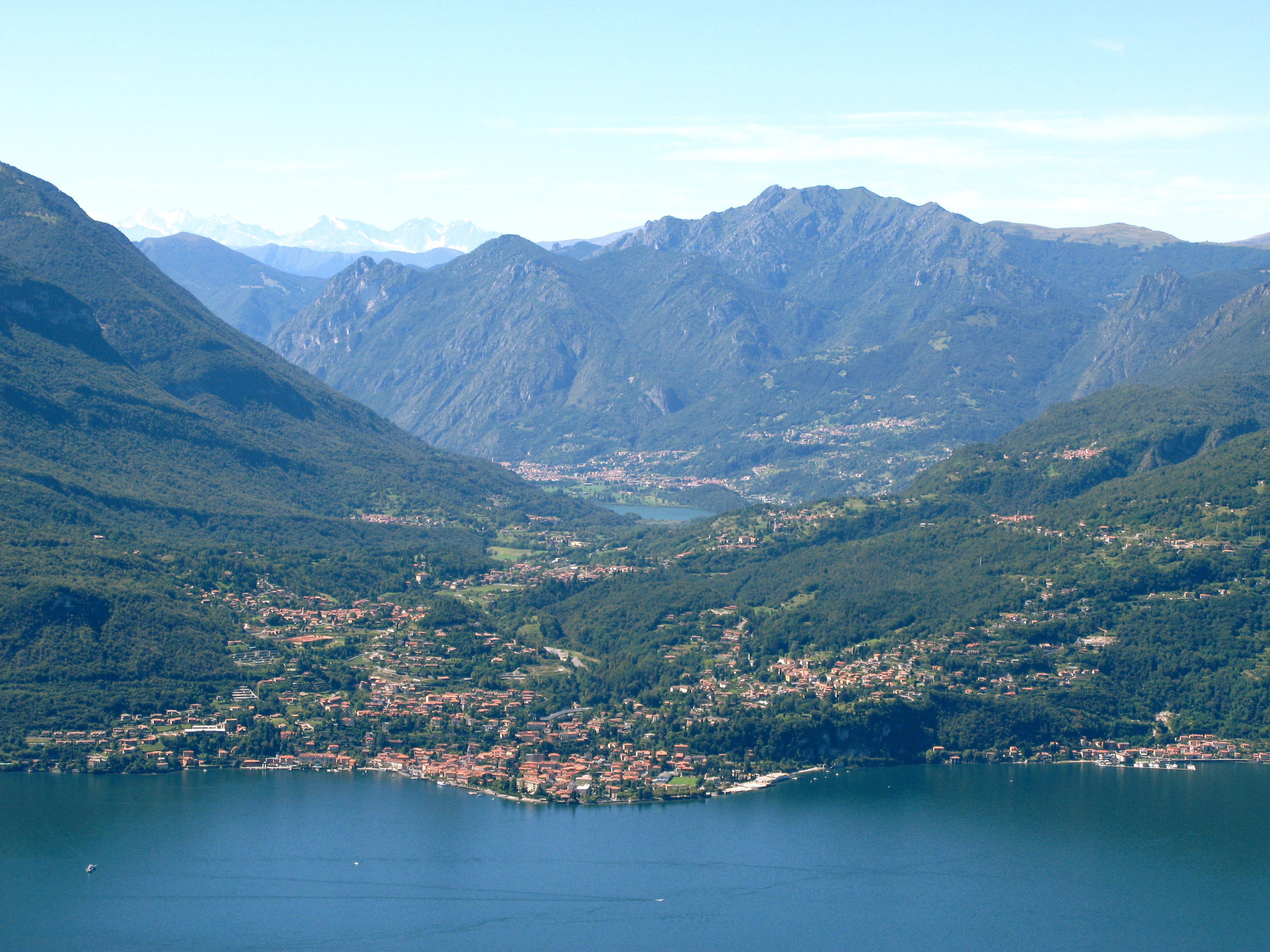 Panorama of Menaggio, Val Menaggio and Porlezza Lake (Lago del Piano)